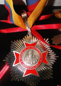 Medalla Orden de la Democracia Simón Bolívar